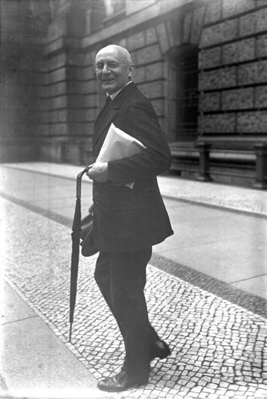 Der deutsche Reichstag aufgelöst! Momentaufnahmen vor dem Reichstag am Tage der Auflösung am 18. Juli mittag 1 Uhr! General Lettow-Vorbeck verlässt lächelnd den Reichstag nach der Auflösung.